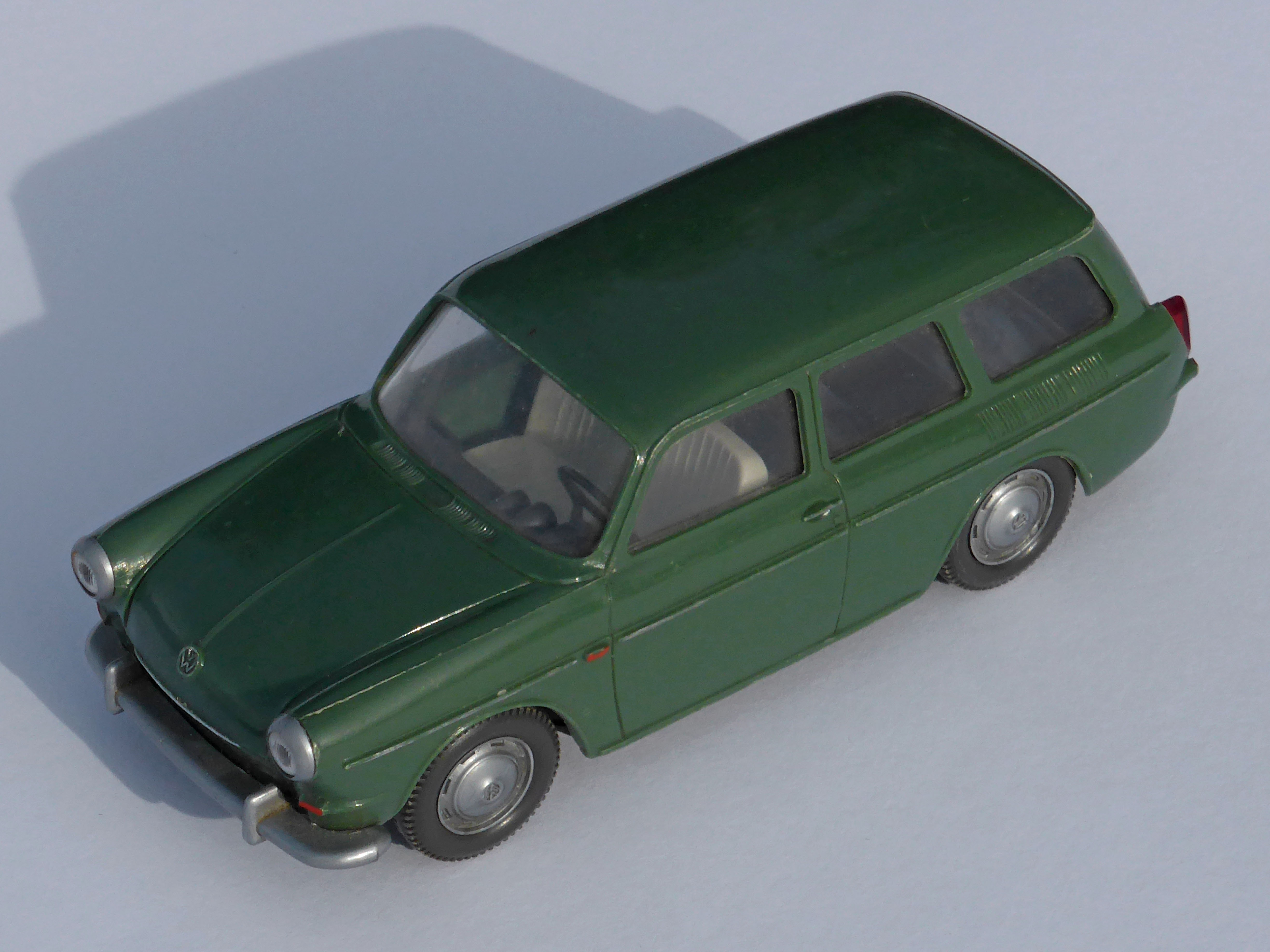 Modellauto "VW Variant" von WIKING im Maßstab 1:40.